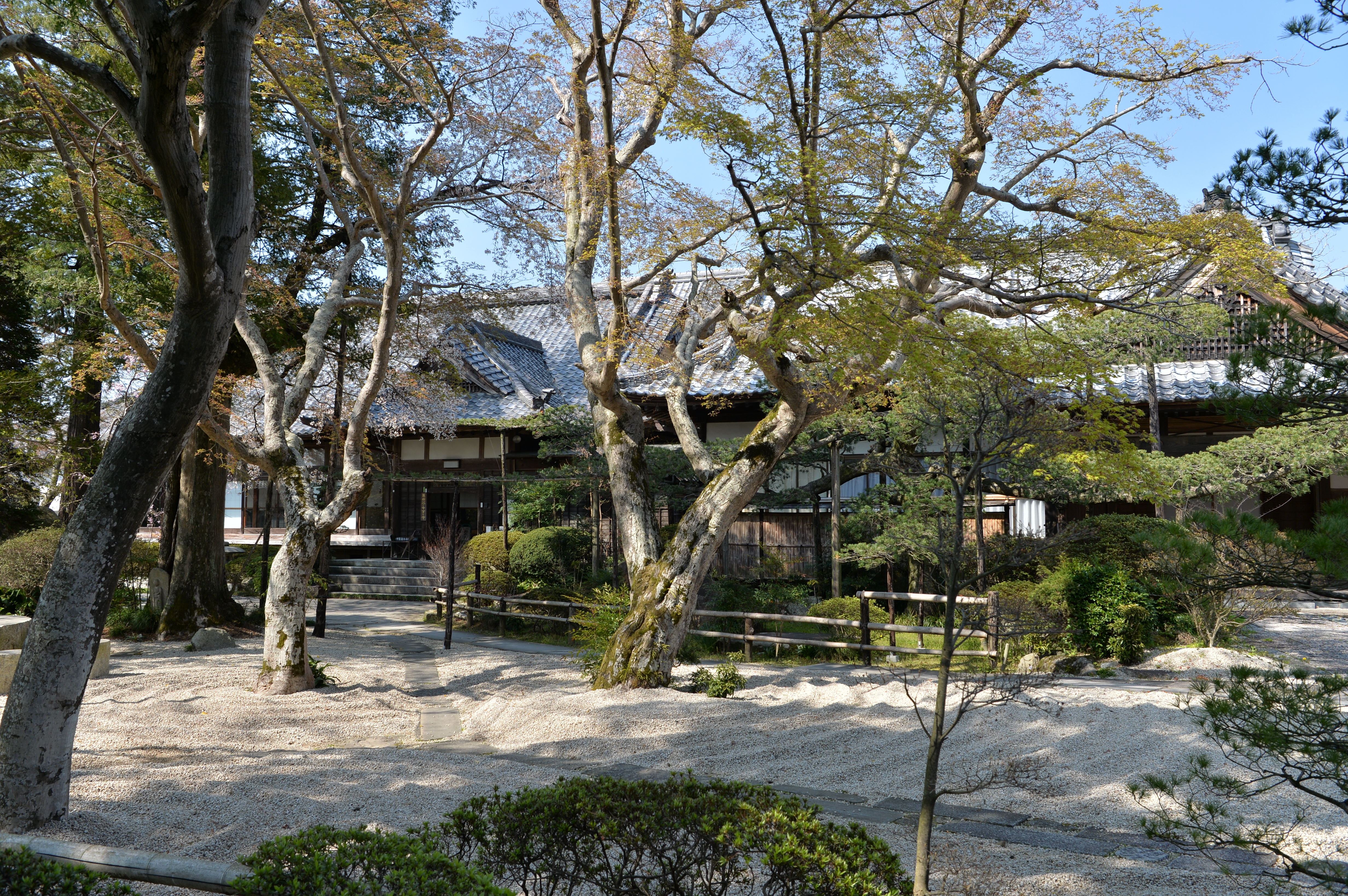 茨城県桜川市西小塙にある、天台宗の寺院。山号は曜光山。庭園側から客殿を撮影。